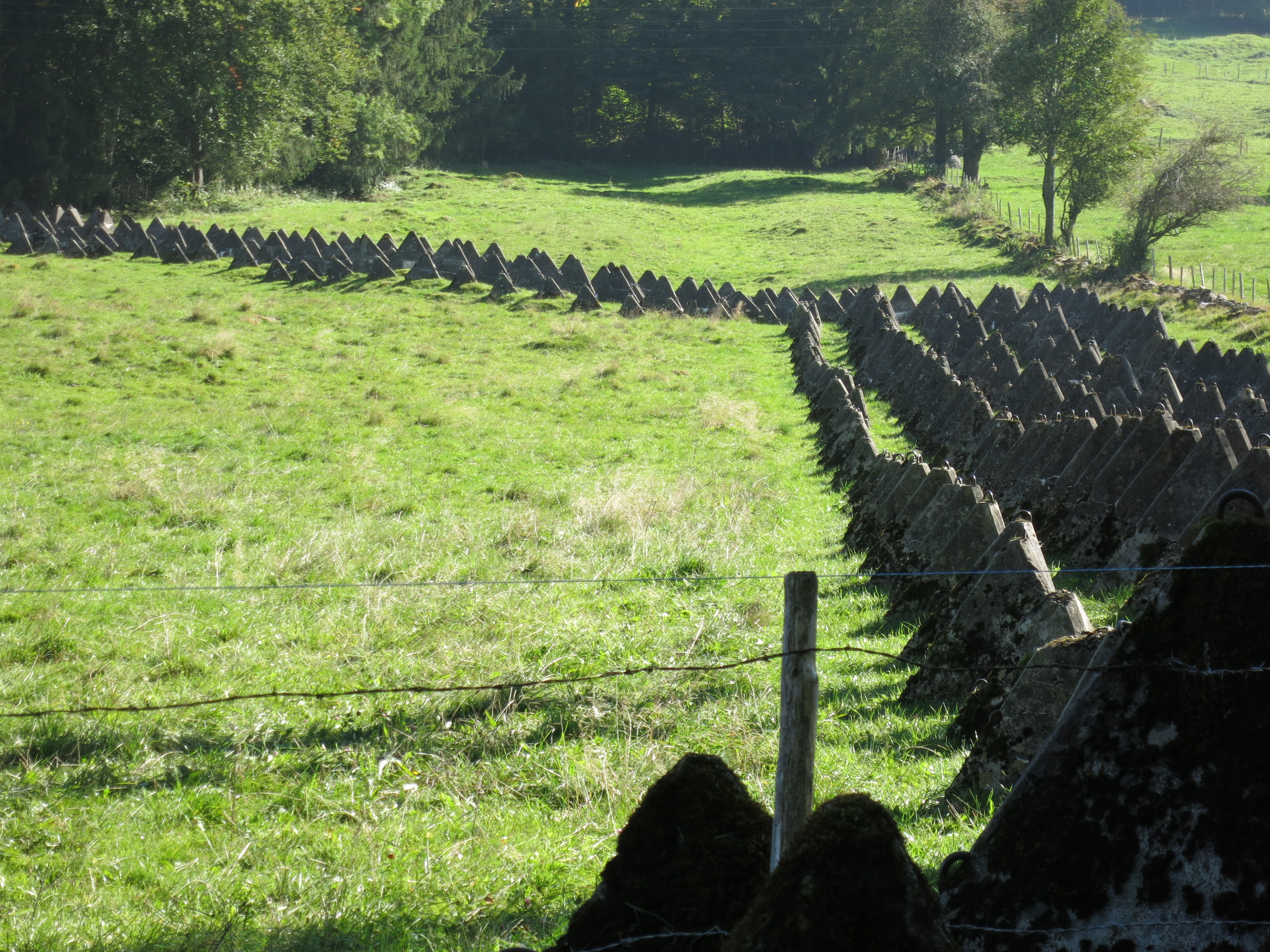 Sperrstelle Wimmis BE, Schweiz